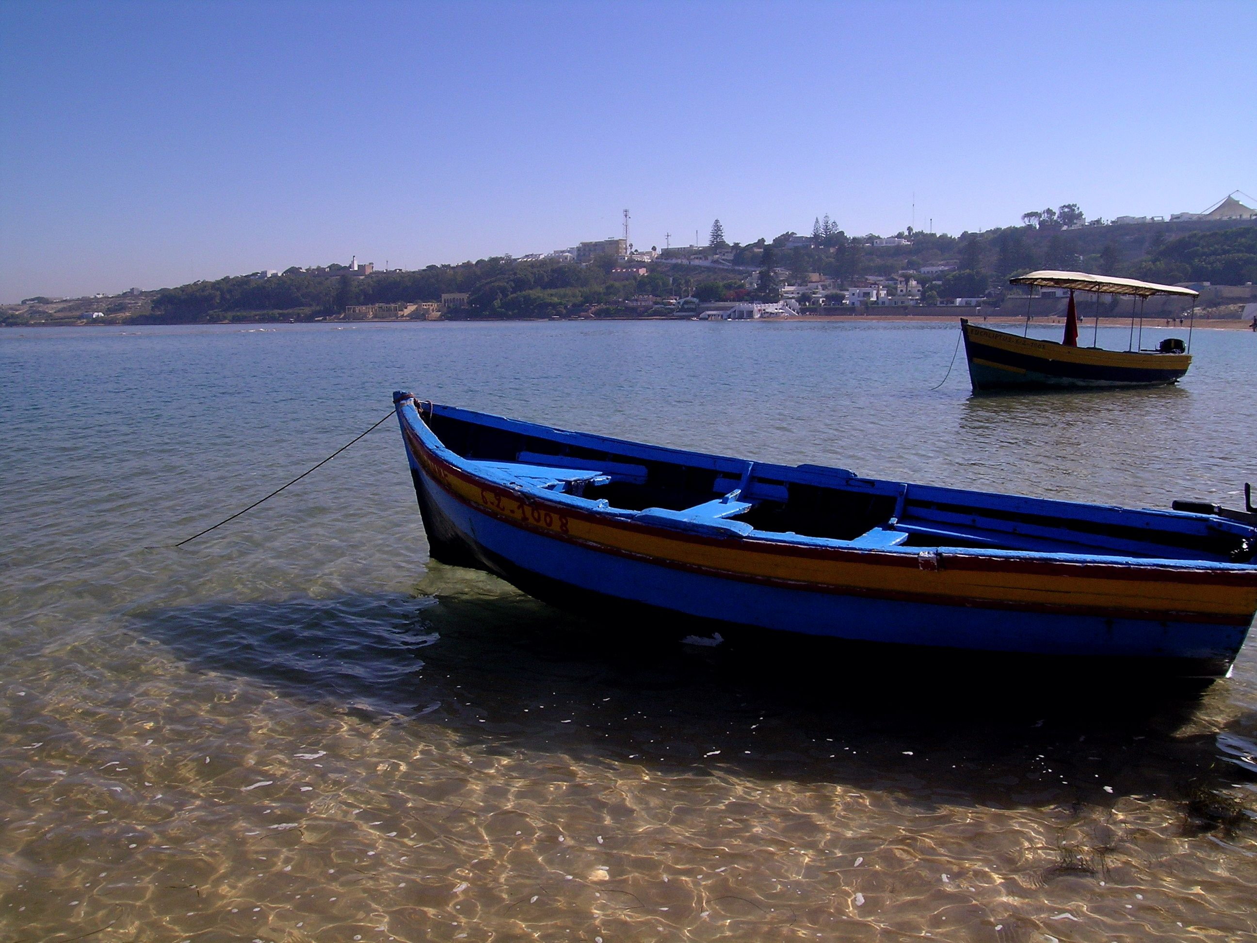 Lagune Oualidia